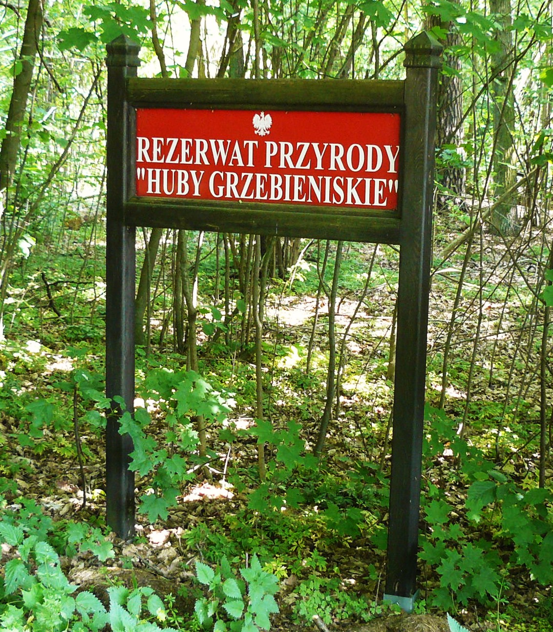 Las Bytyński.